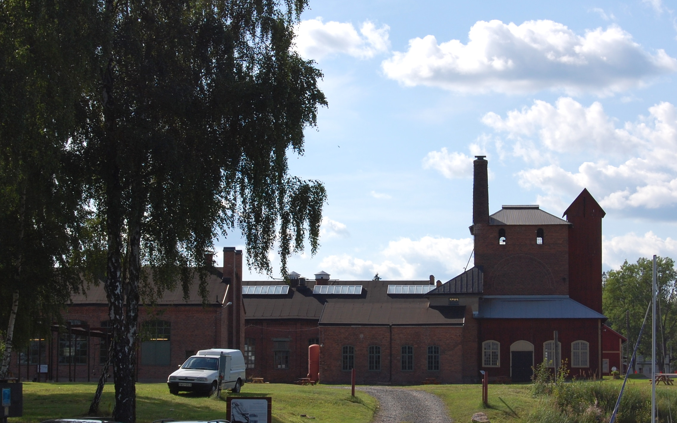 Åminne Bruksmuseum.